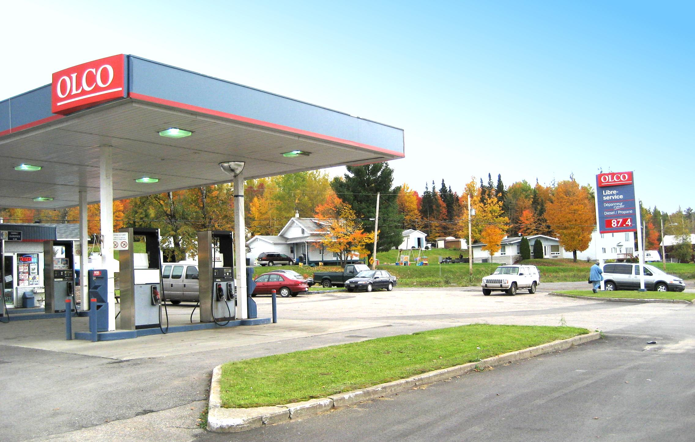 Dépanneur en automne à Stoneham Qc Canada